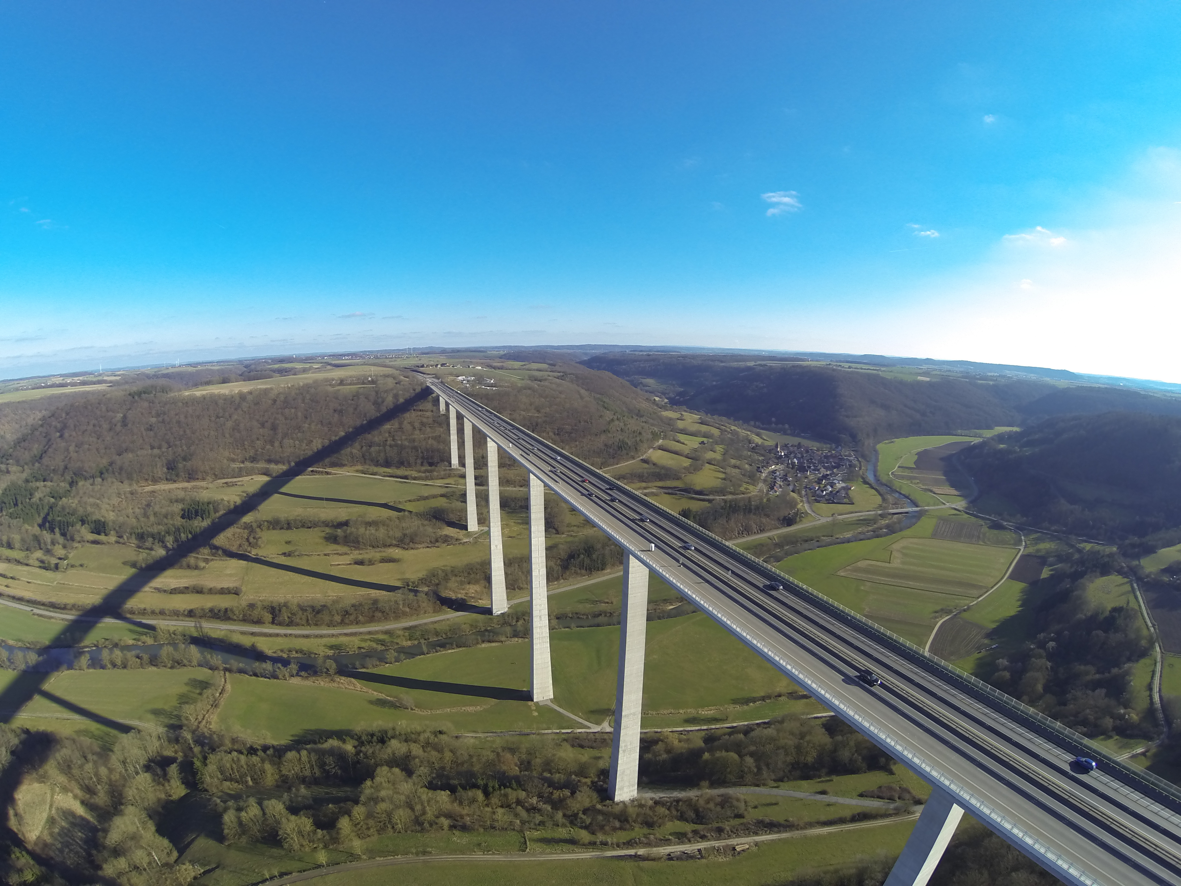 Höchste Brücke Deutschlands A6